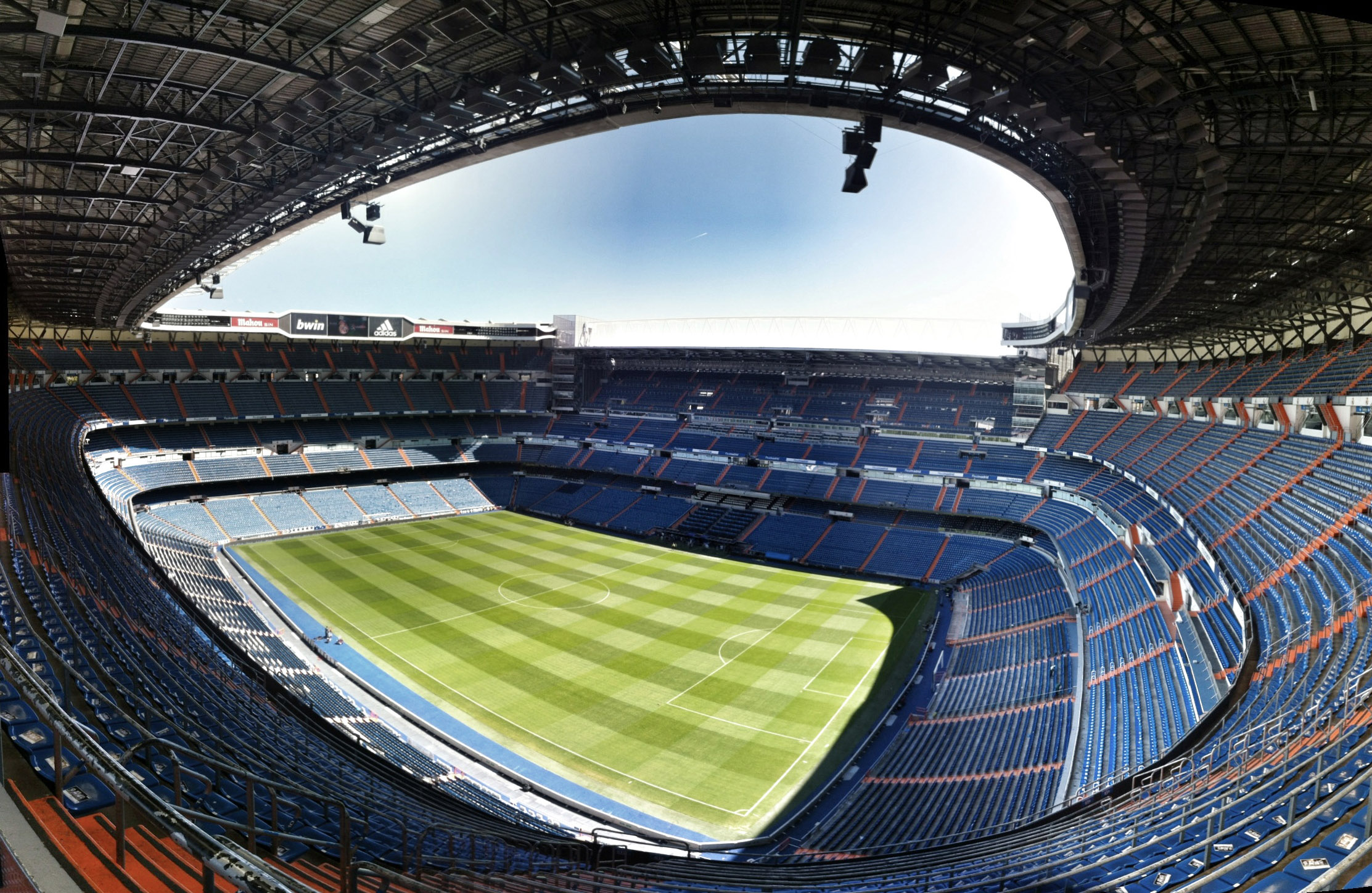 Estadio Santiago Bernabéu Mai 2013